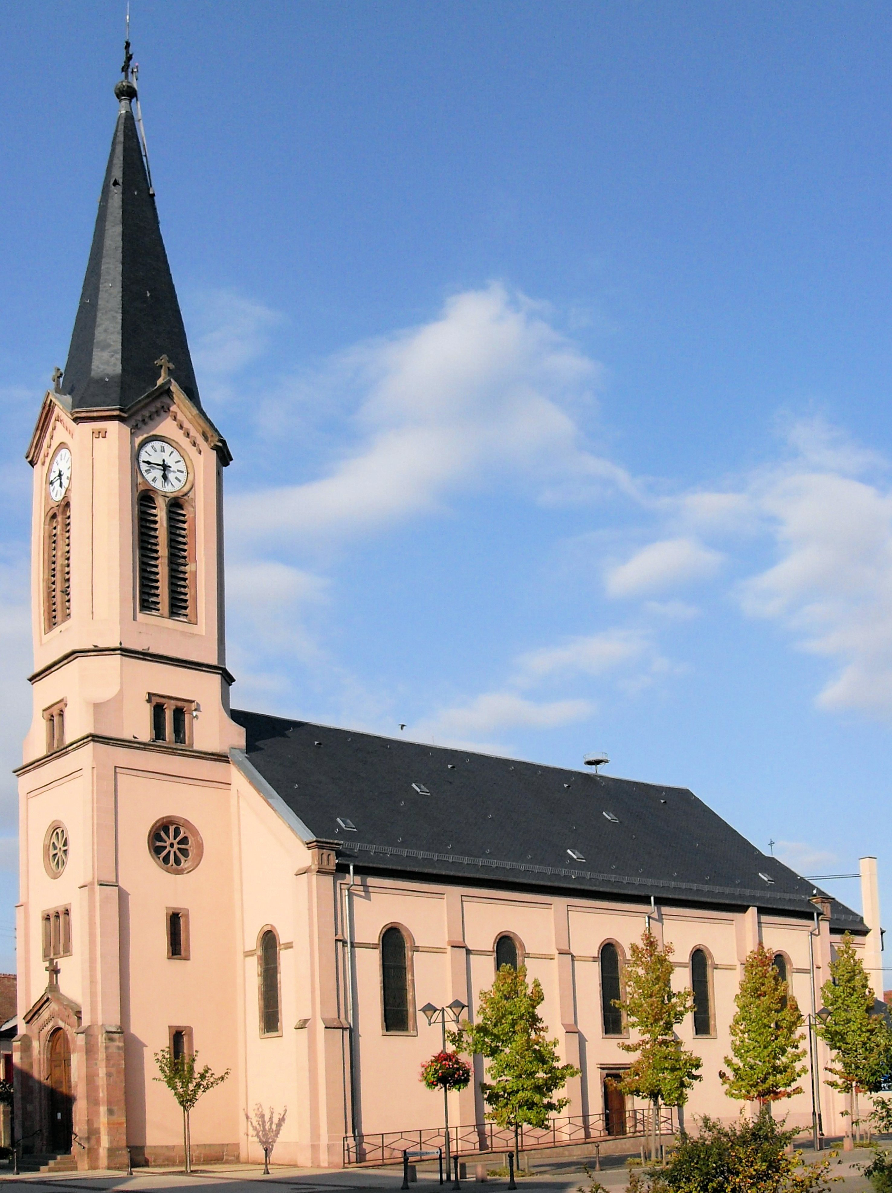 L'église Saint-Maurice à Houssen